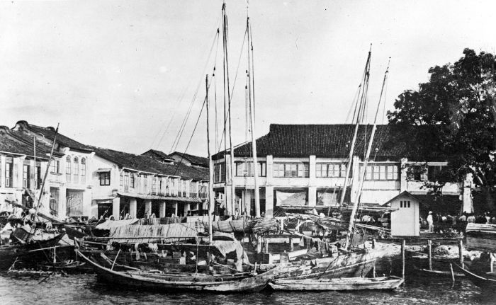 Repronegatief. Silaukade te Tandjoengbalai, Asahan, Sumatra